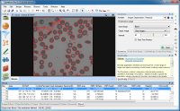 Capture d'écran d'Aphelion Dev